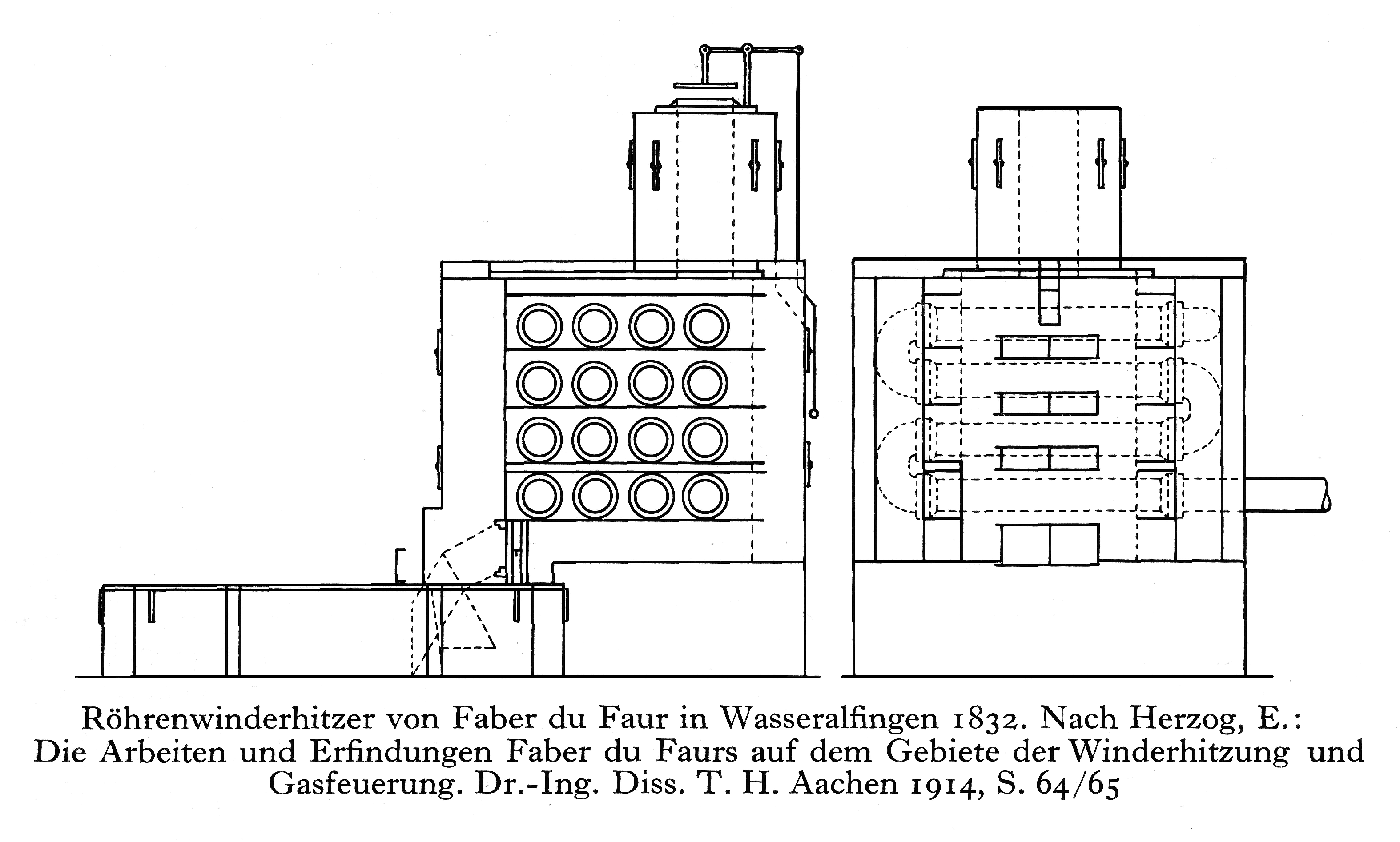 Röhrenwinderhitzer von Faber du Faur in Wasseralfingen (1832) ; nachgezeichnet durch E. Herzog für Die Arbeiten und Erfindungen Faber du Faurs auf dem Gebiete der Winderhitzung und Gasfeuerung (1914)